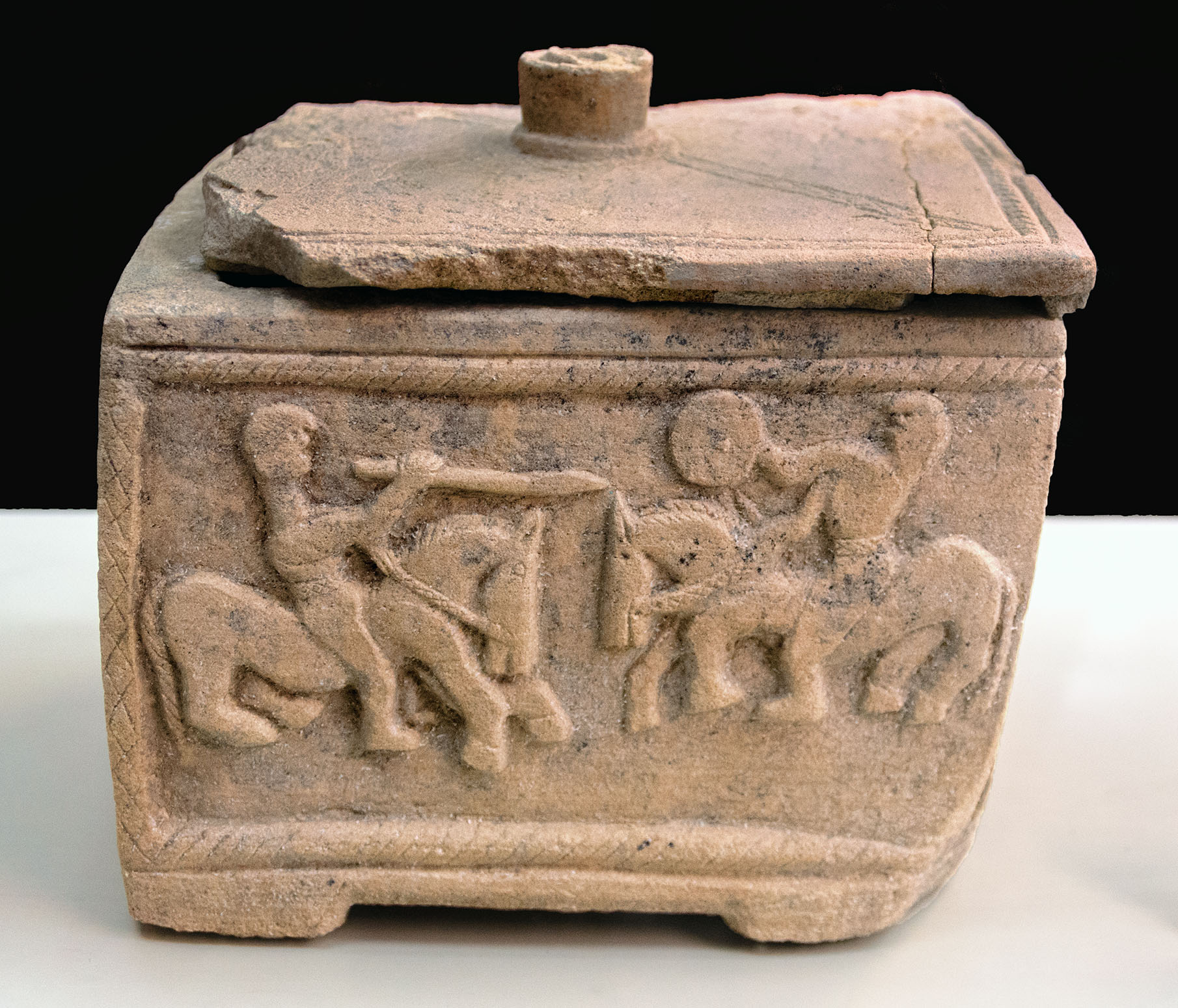 Caja de los Guerreros, de la necrópolis de Piquía (Arjona, Jaén).